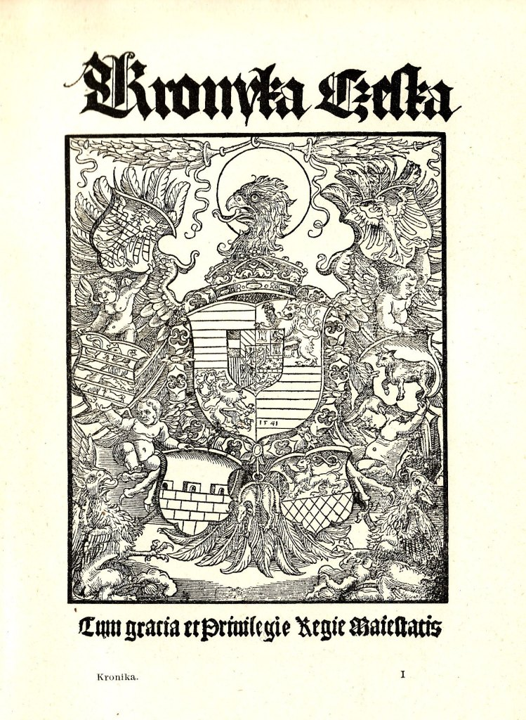 Václav Hájek, Kronyka Česká (1541, title page)